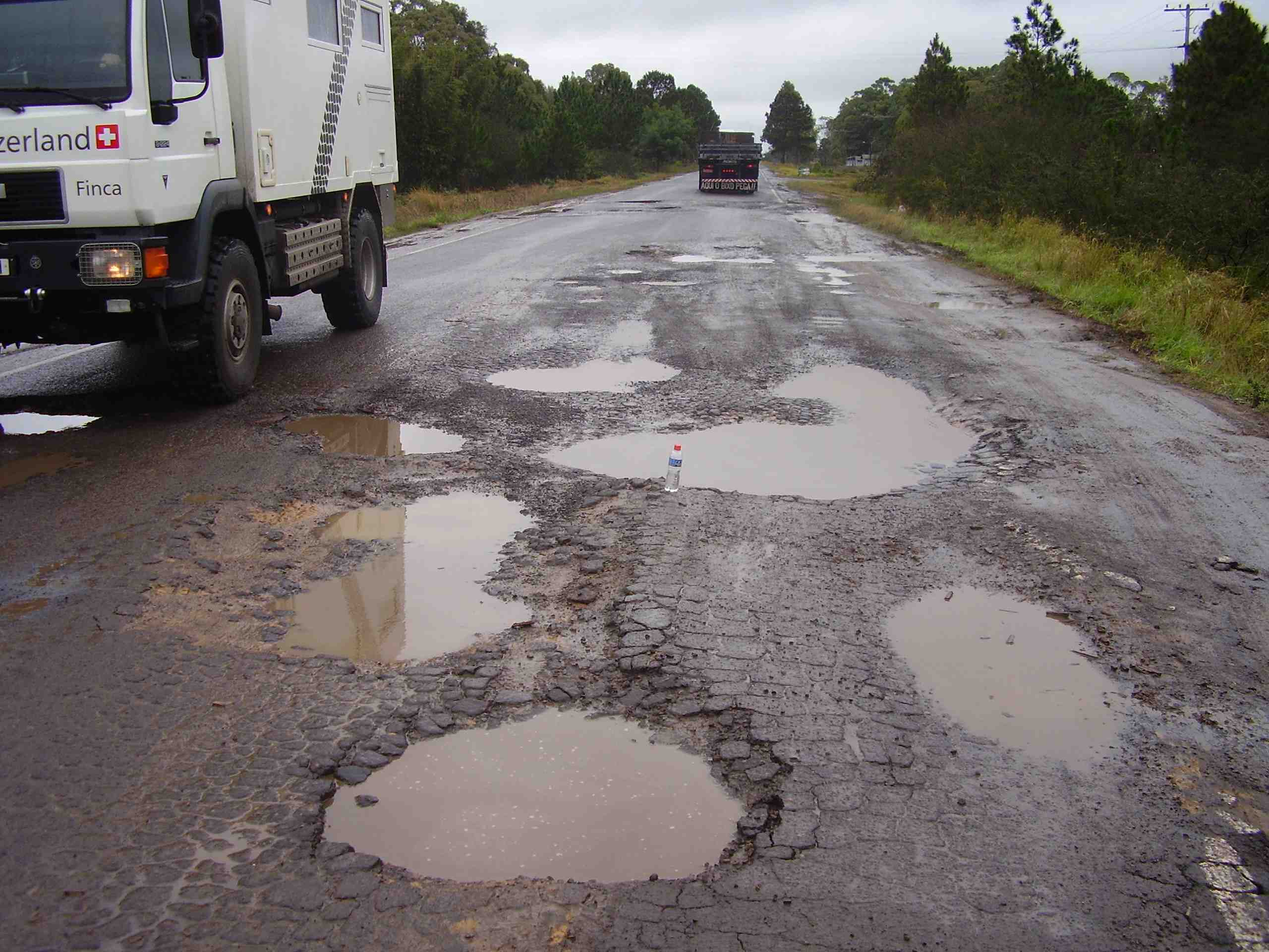 La BR-101 a su paso por Rio Grande do Sul.